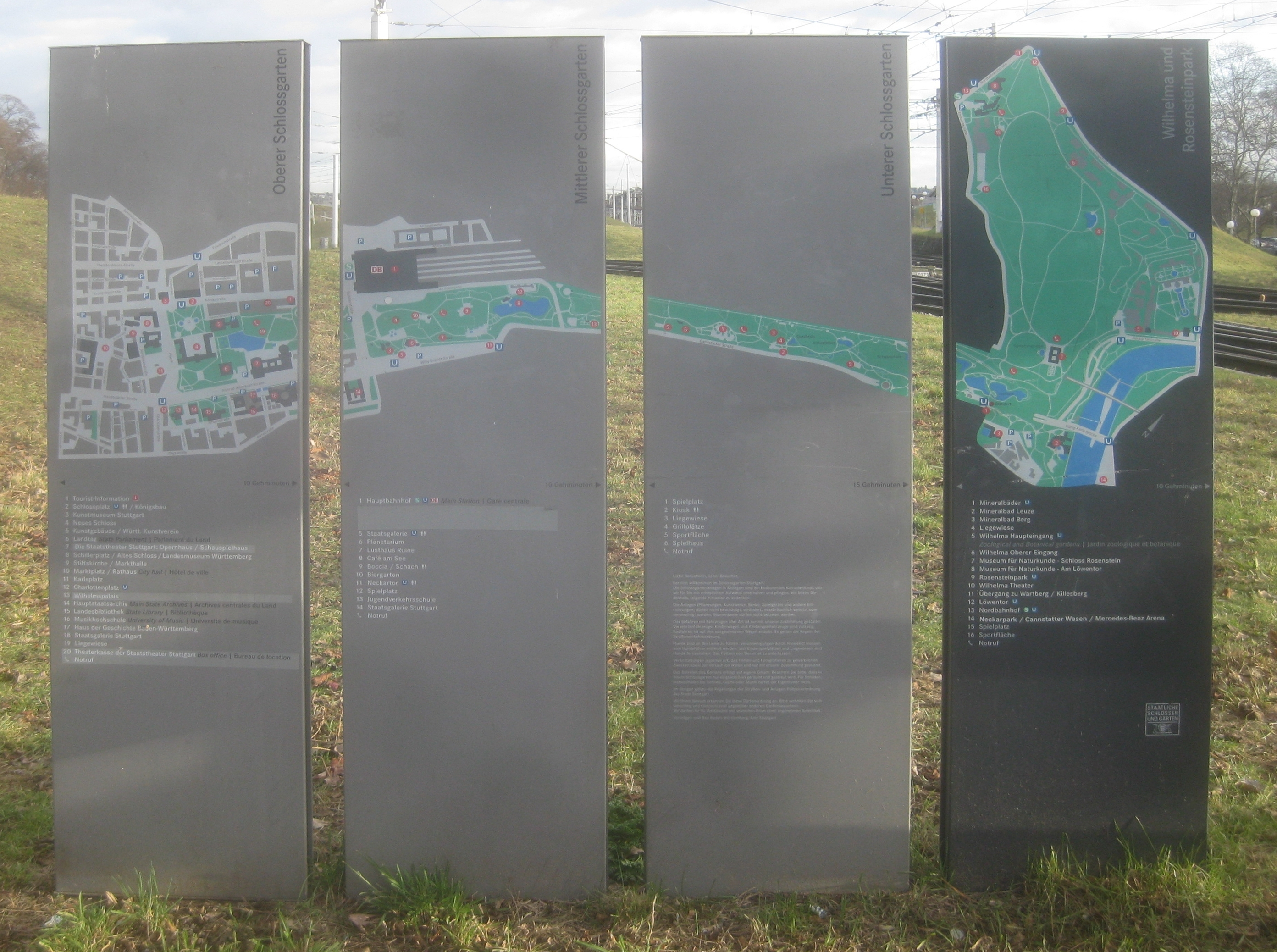 Hinweistafel „Oberer, Mittlerer und Unterer Schlossgarten, Wilhelma und Rosensteinpark“, nach der Stadtbahnhaltestelle Mineralbäder am Eingang zum Rosensteinpark.